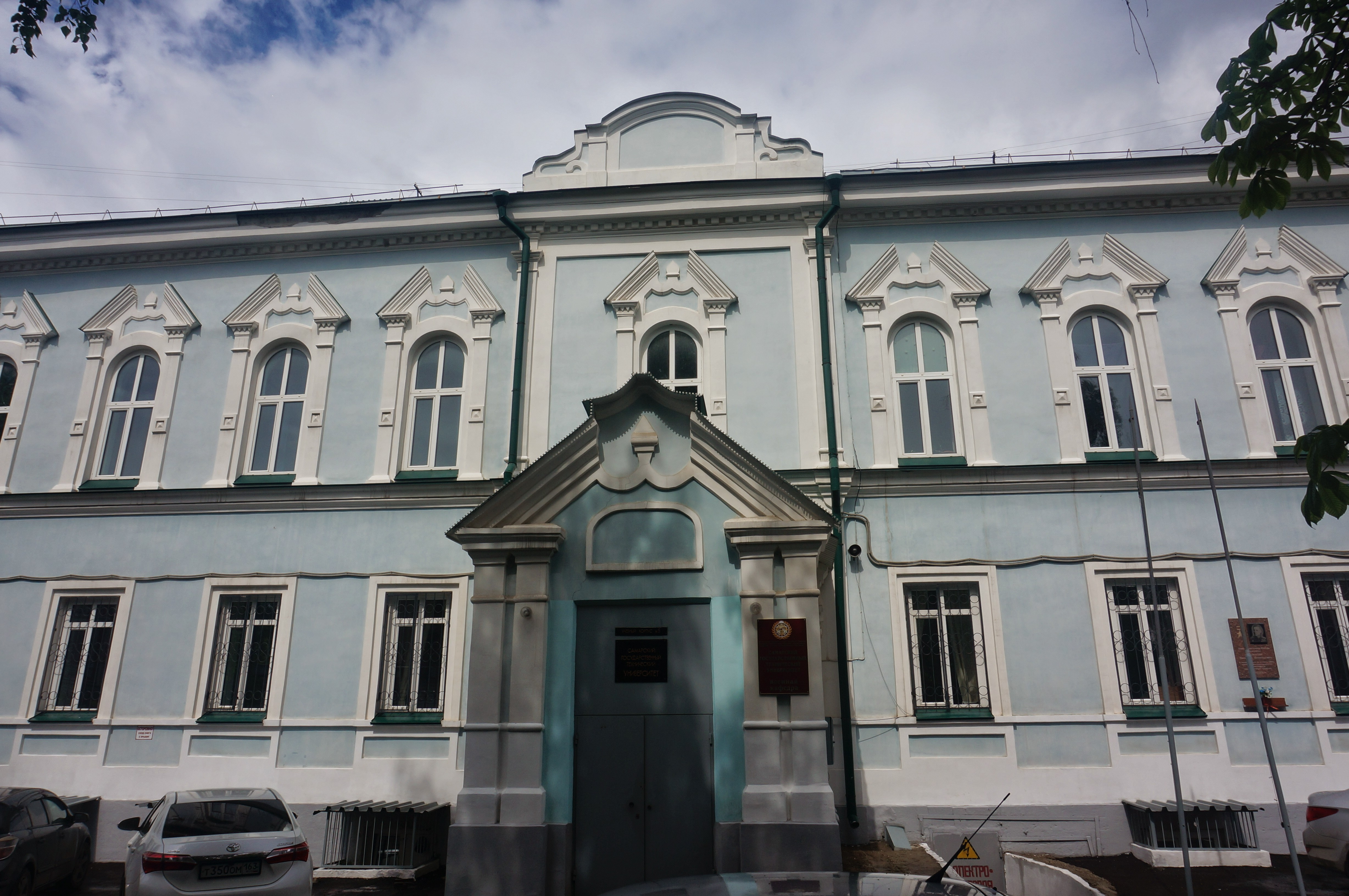 Бывшее здание Самарского архиерейского дома. Теперь здание СамГТУ